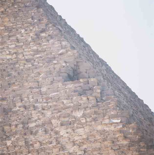 L'encoche sur une des arêtes de la pyramide de Khéops en Egypte